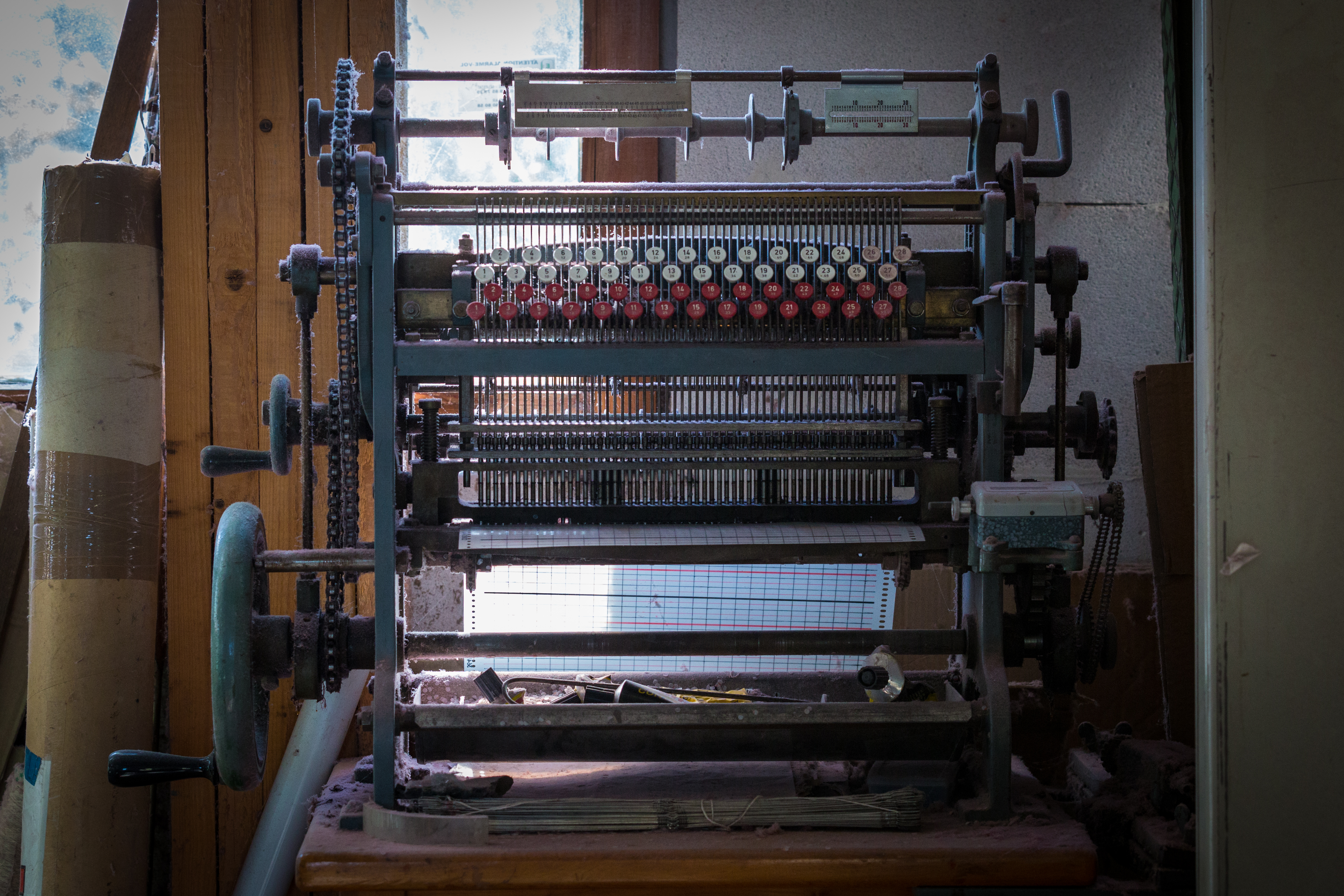 Atelier de tissage Michel Gander - Muttersholtz mai 2015